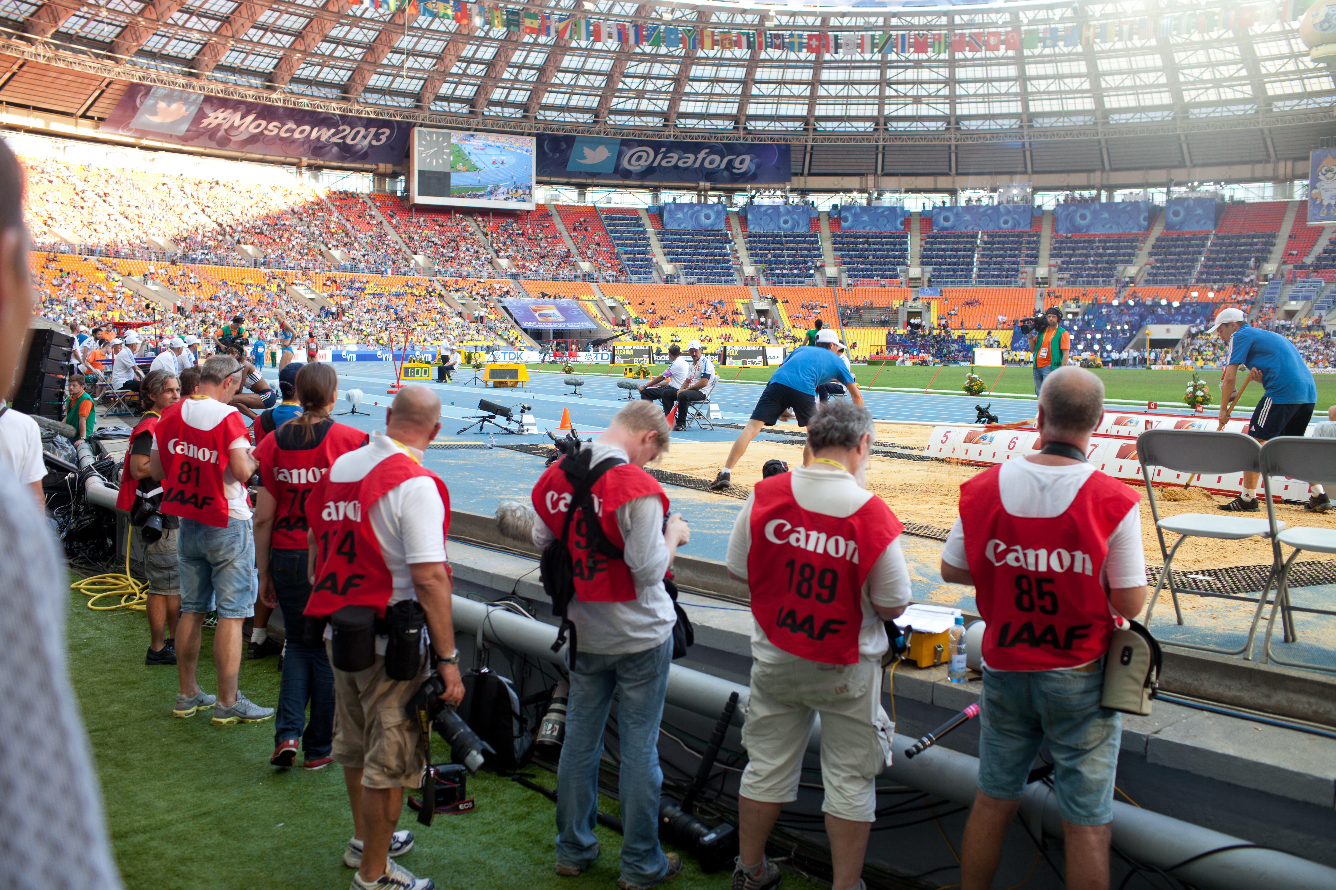 Первый день Чемпионата мира по легкой атлетике в Москве